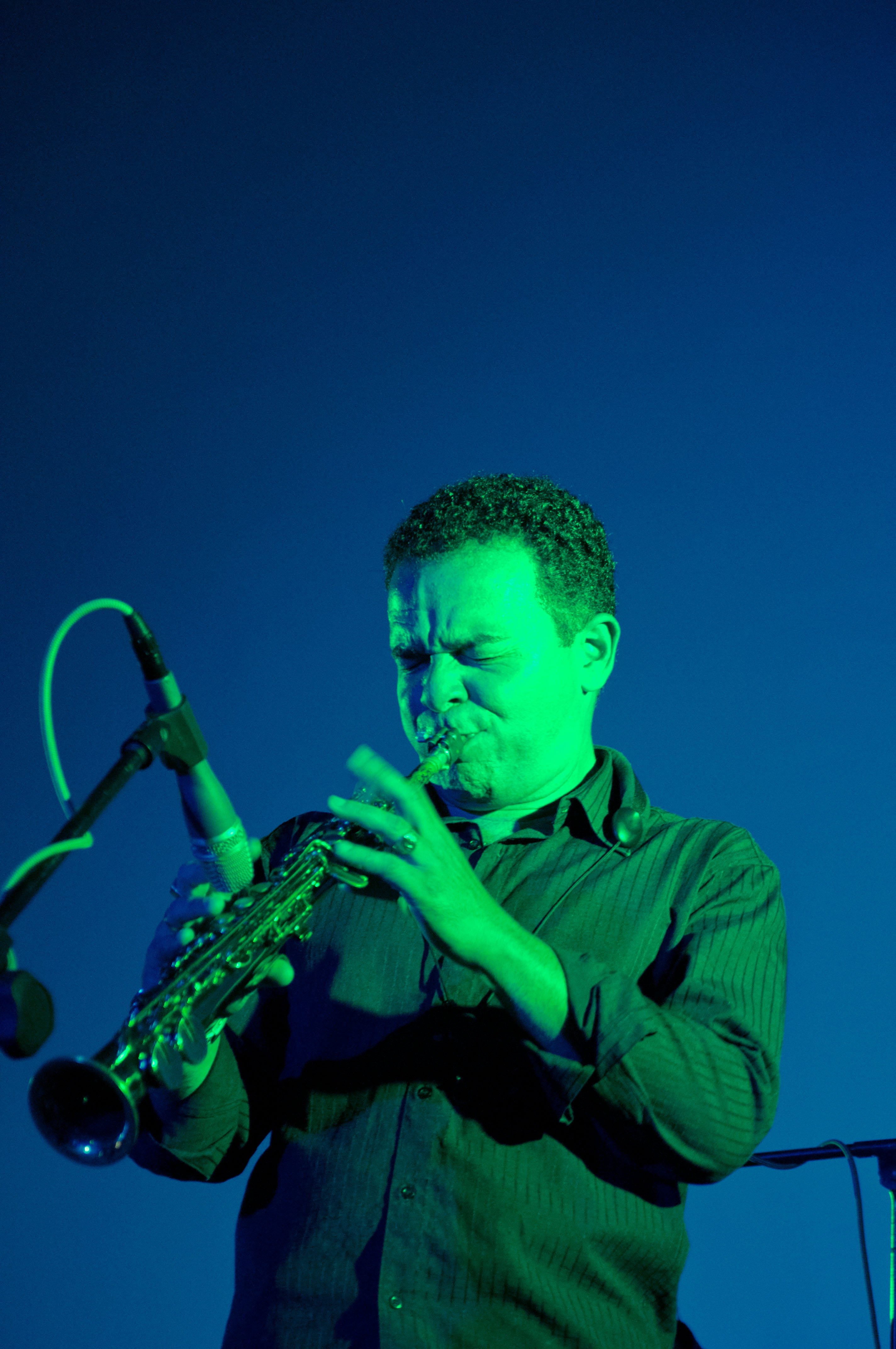 Músico Zé Canuto, em um show na Guatemala em 2011.